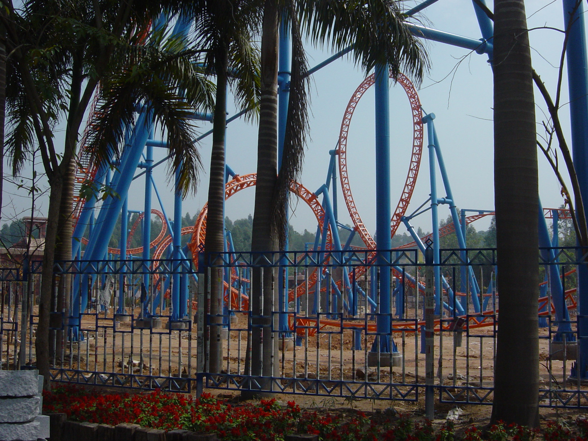 广州长隆欢乐世界内的十环过山车（拍摄时尚未完工），由上传者老火豆沙煲于2006年2月21日拍摄。